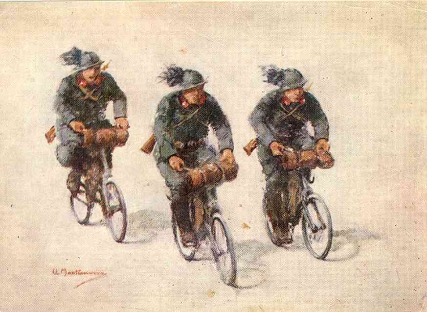 Cartolina riproducente i Bersaglieri ciclisti - Monfalcone, 6 agosto 1916 - verso q.85 - Associazione Nazionale Bersaglieri